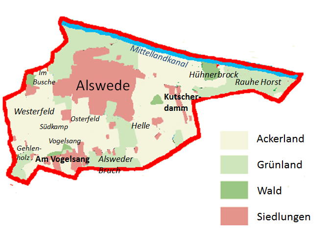 Bodennutzung, Siedlunge und Landschaften von Alswede